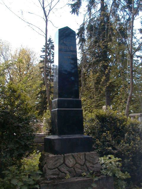 Kenessey Béla (1858-1918) teológiai író, református püspök sírja Kolozsvárott, a Házsongárdi temetőben. 178